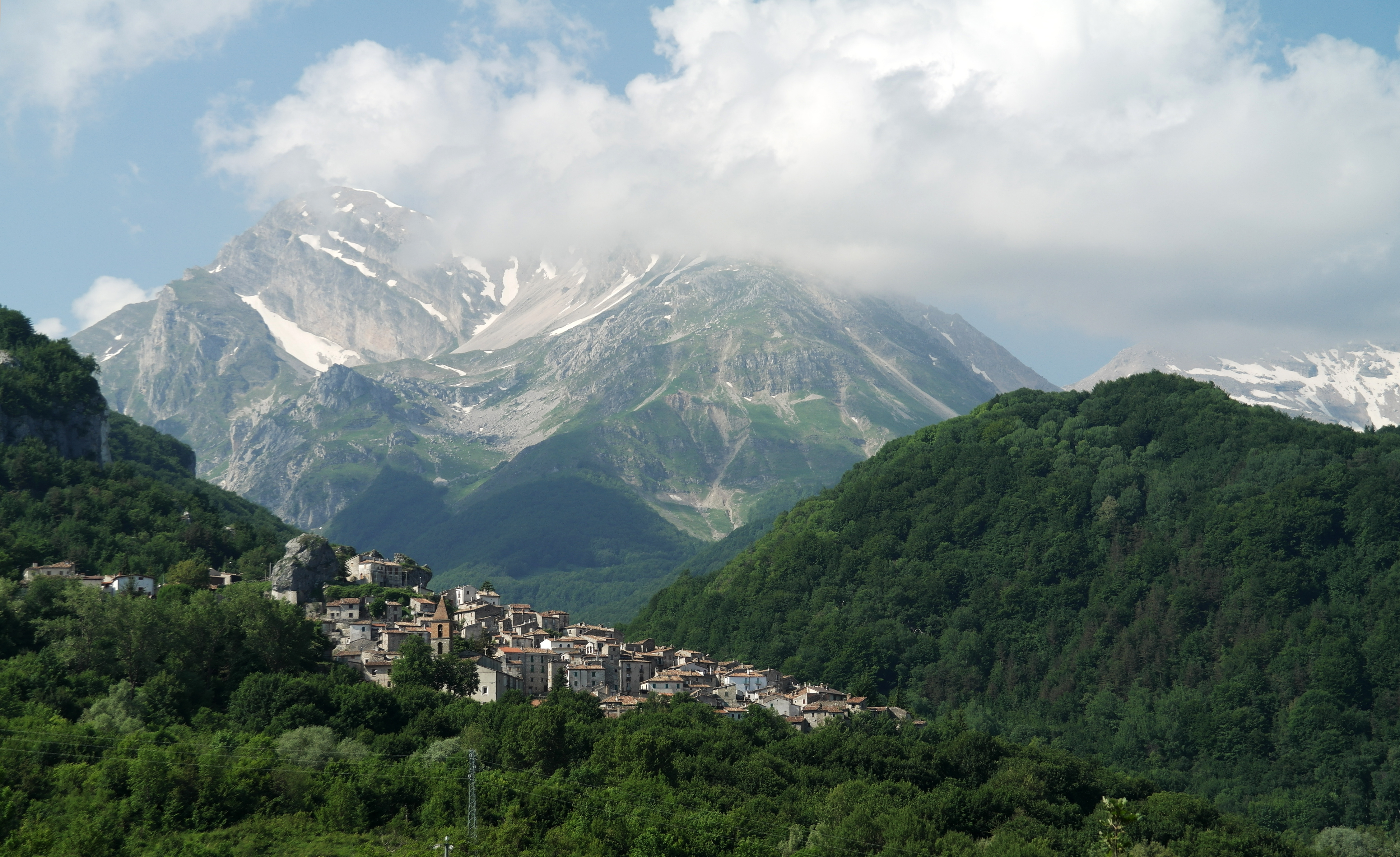 Corno grande e Pietracamela, Gran Sasso, Province of Teramo, Abruzzo, Italy